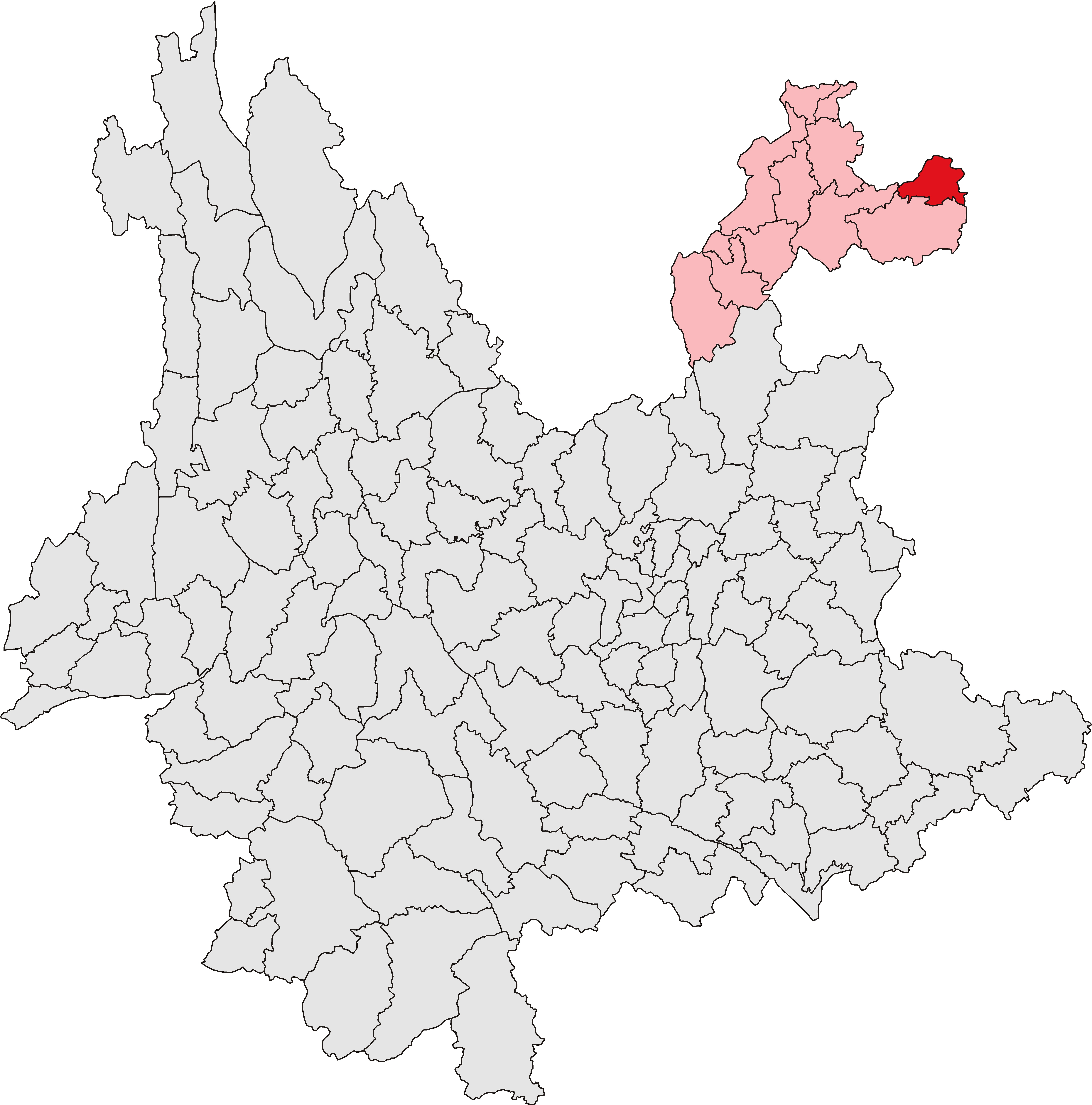 中文（中国大陆）: 威信县位置图